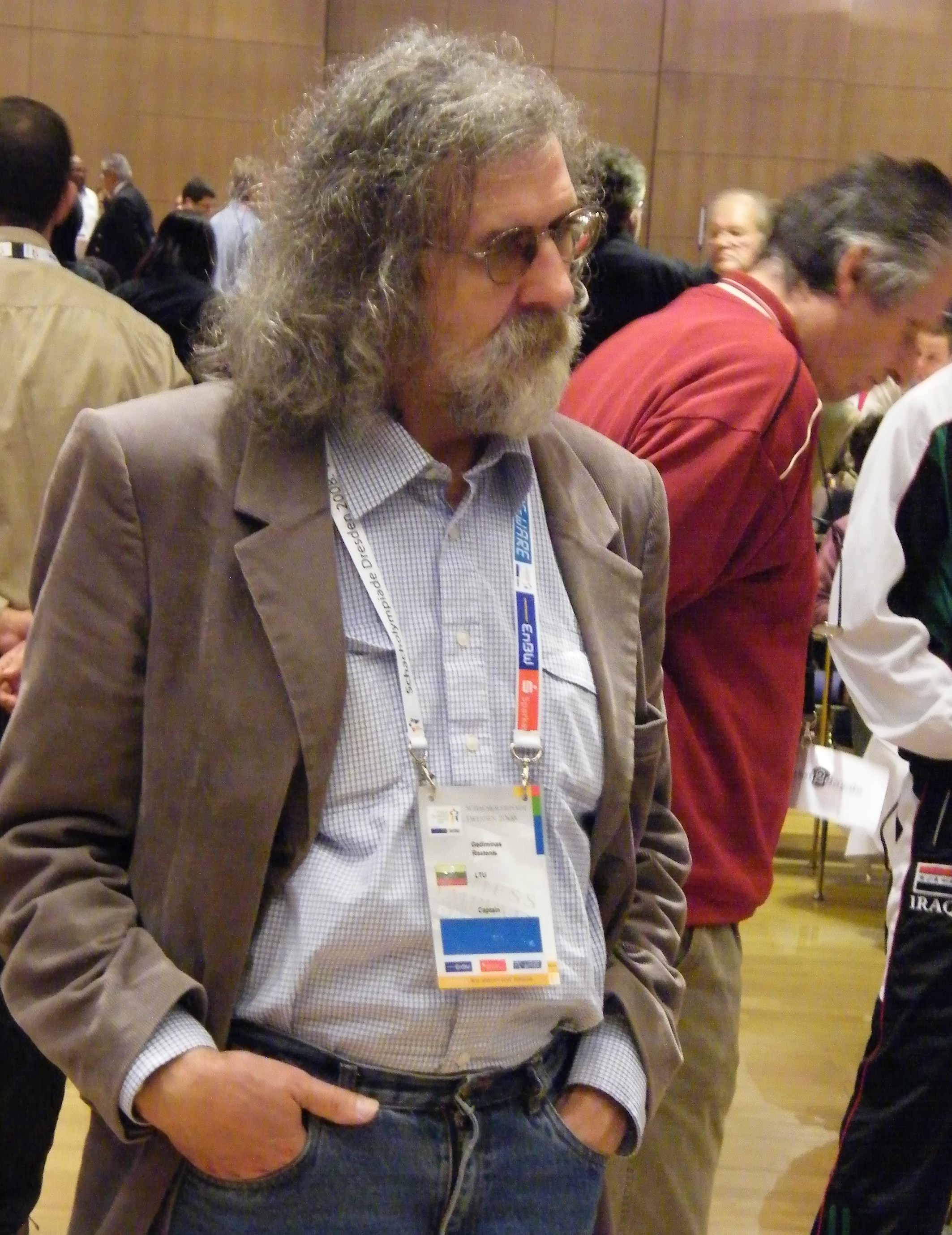 Rastenis Gediminas bei der Schacholympiade 2008 in Dresden Kapitän der litauischen Damenmannschaft